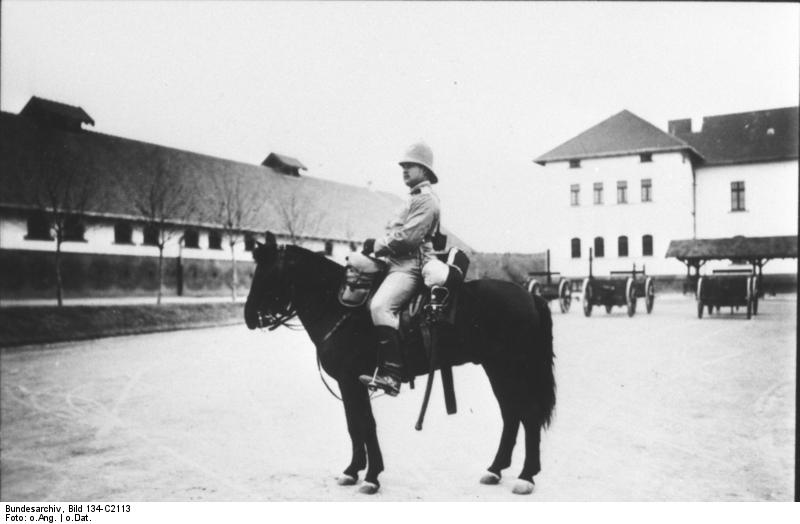 Schutztruppe Kiautschou Unteroffizier der Marine-Feldbatterie